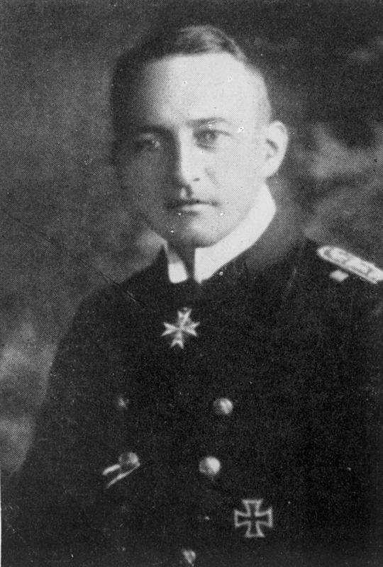 Kapitänleutnant Schwieger, Walther (gefallen Sept. 1917)